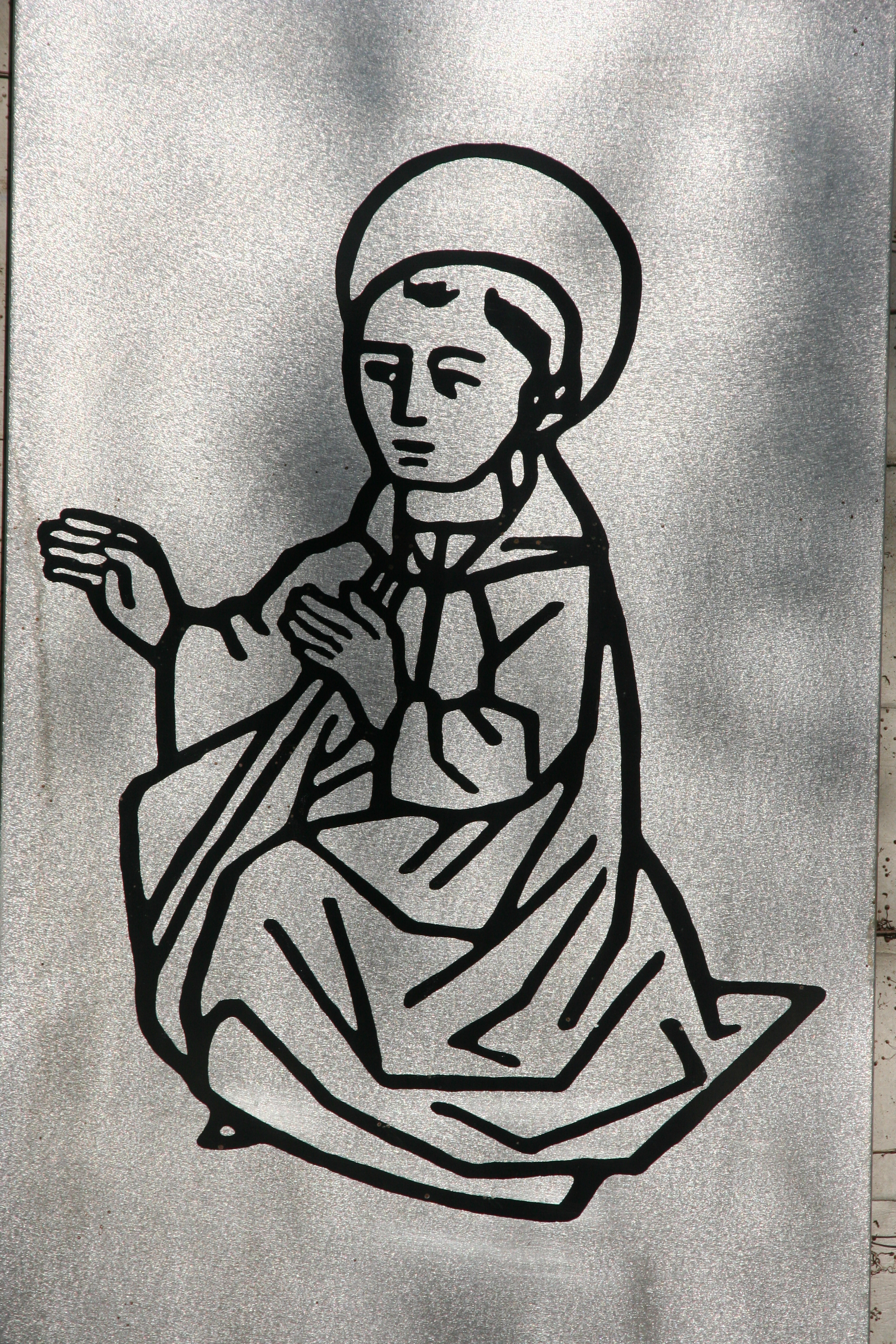 Römisch-katholische Pfarrkirche St. Pirminius Pfungen, Abbildung des Hl. Priminius im Aussenbereich